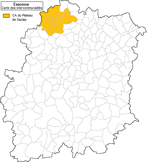 Carte des communes de la communauté d'agglomération du plateau de Saclay en Essonne (91)